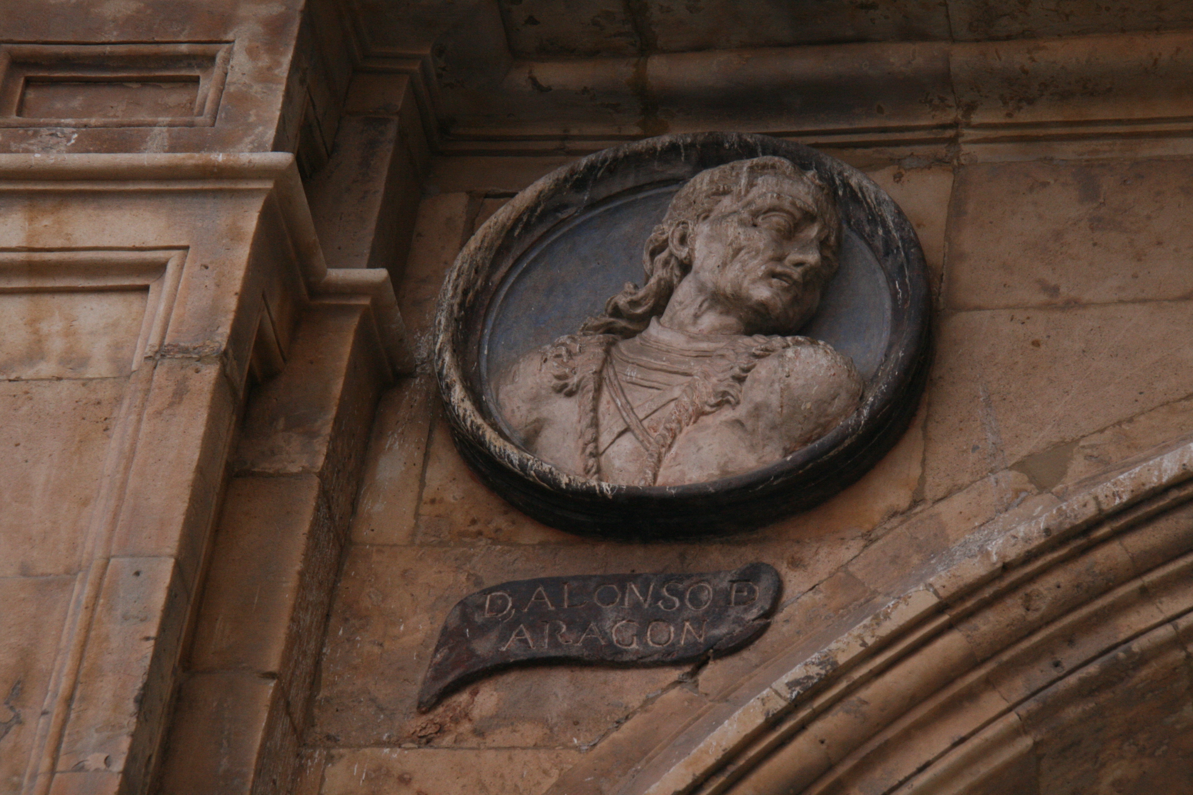 Alonso de Aragón, (Cervera 1470 - Lécera 24 de febrero de 1520). Hijo natural de Fernando el Católico y de Aldonza de Ivorra